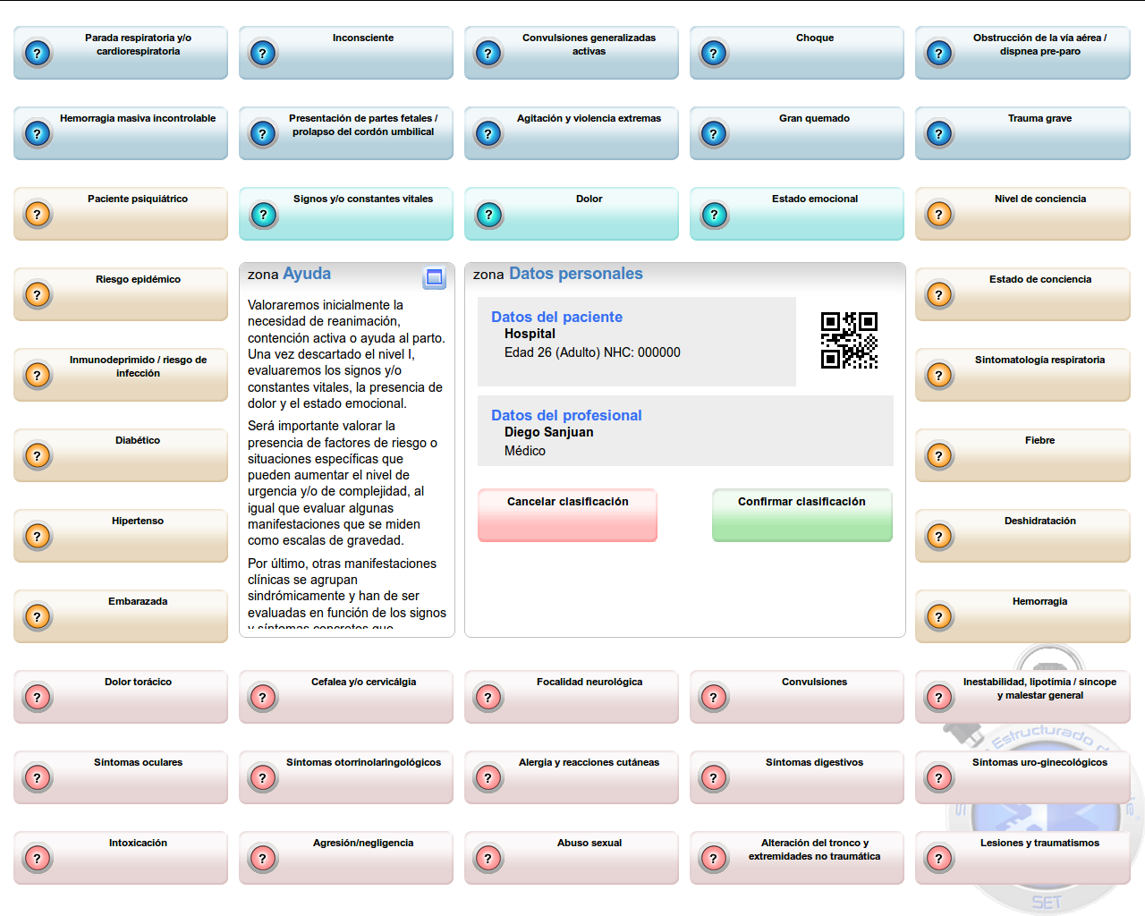 Pantalla Software web_e-PAT